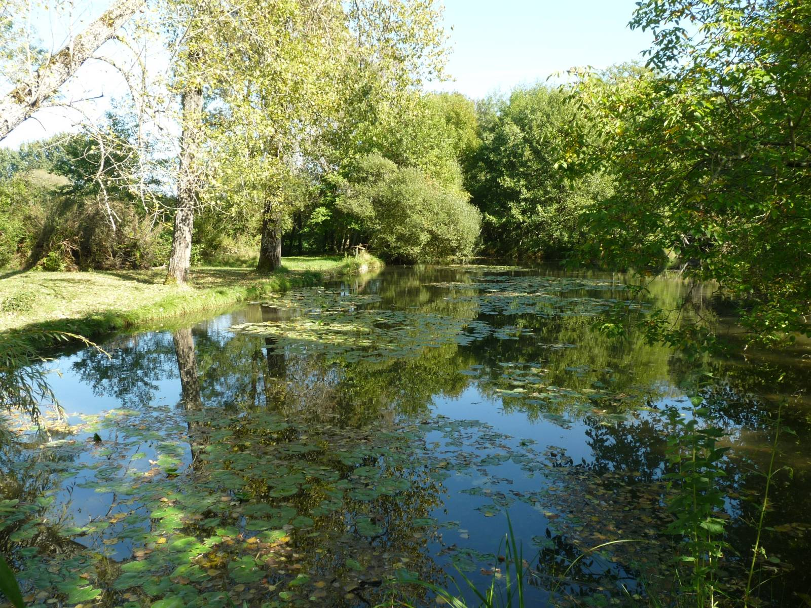 la Pude à la Chapelle-Grésignac (24), France